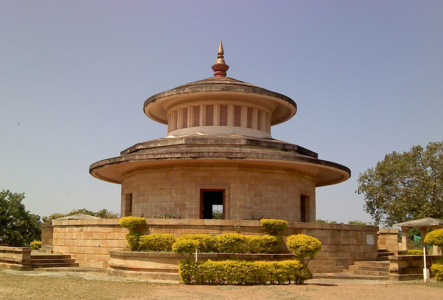 Kalidas Smarak, Ramtek